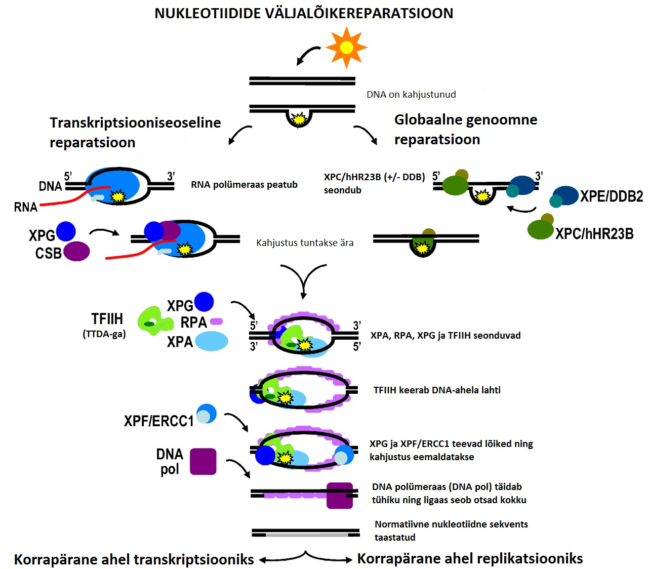 Kui DNA on UV-kiirguse poolt kahjustatud tekivad DNA-sse kahjustused. Kahjustused tuntakse ära erinevalt, vastavalt sellele, kas DNA on transktsiooniliselt aktiivne (transkriptsiooniseoseline reparatsioon) või mitte (globaalne reparatsioon). Pärast esmast äratundmist on järgnev protsess mõlemal sarnane. Lõpptulemuseks on esialgse DNA taastamine.